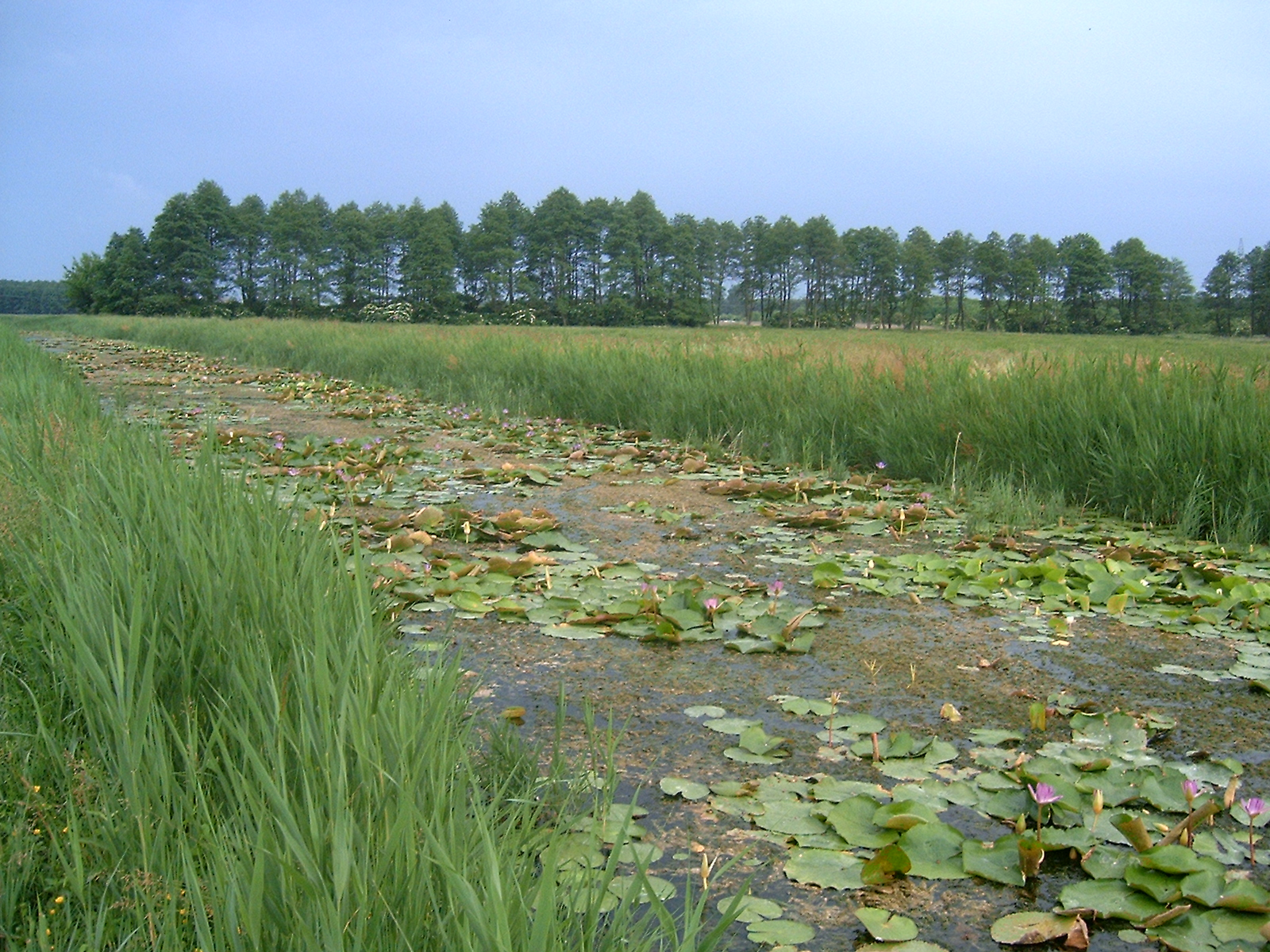 Hévízi-csatorna, Úsztató major fölötti szakasza